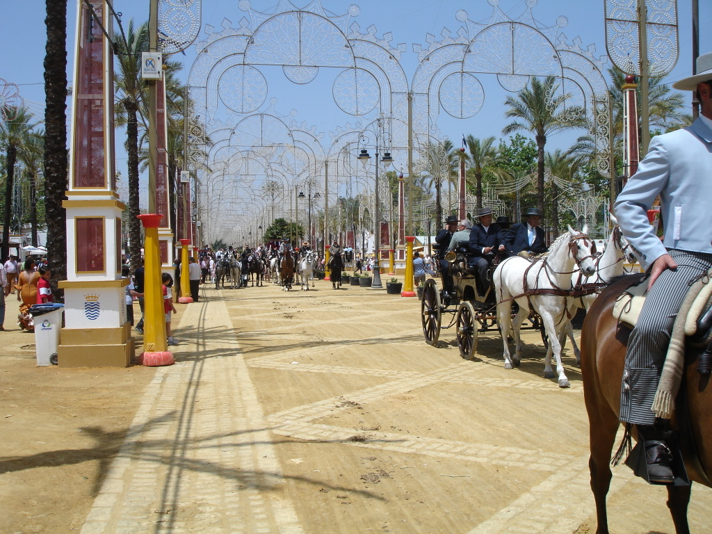 Feria del Caballo 2007, Jerez (Spain)